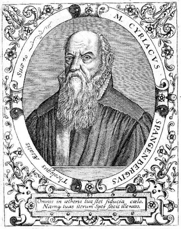 Cyriakus Spangenberg